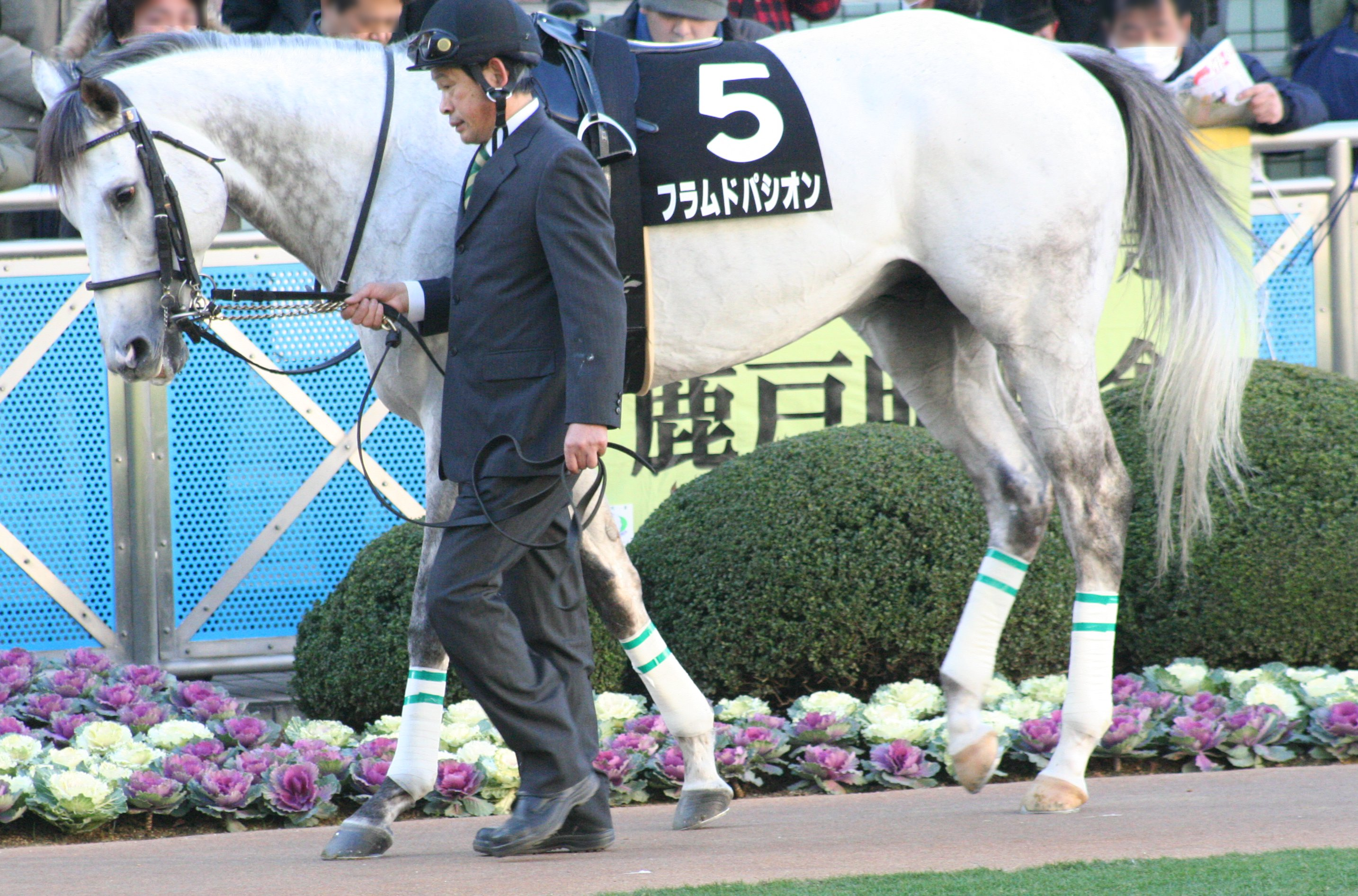 Flamme de Passion